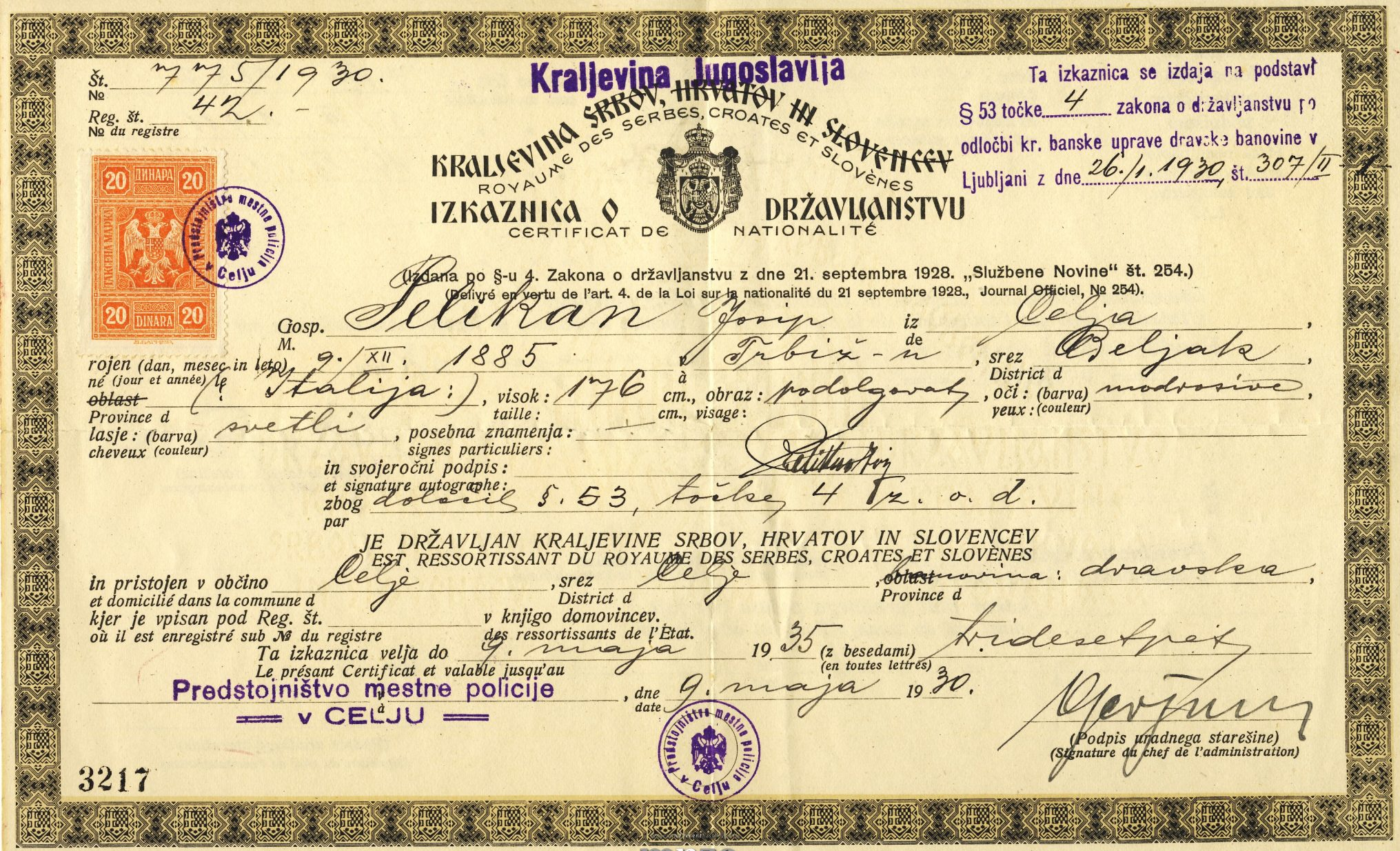 Potrdilo o jugoslovanskem državljanstvu.